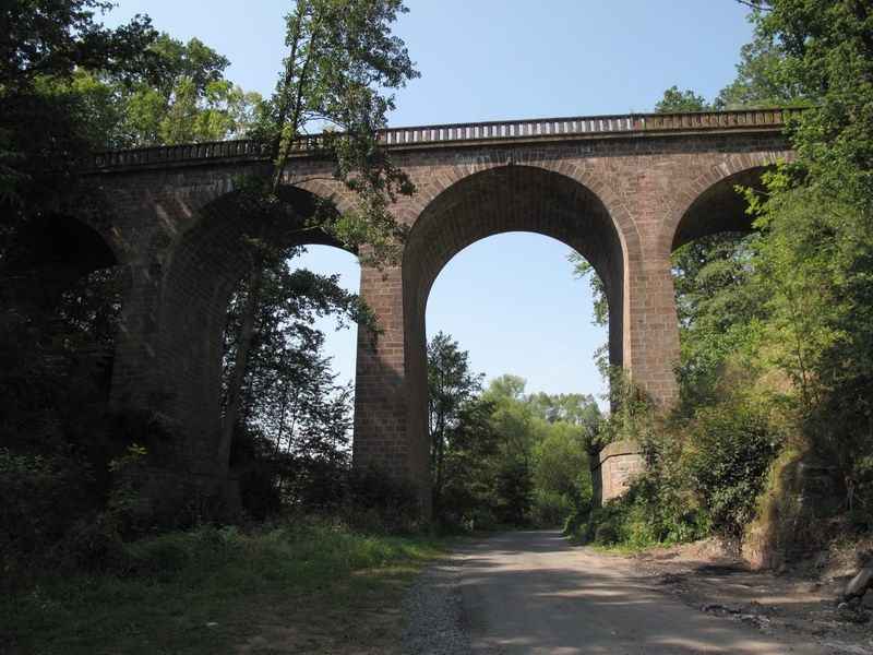 Altes Eisenbahnviadukt bei Waldkappel